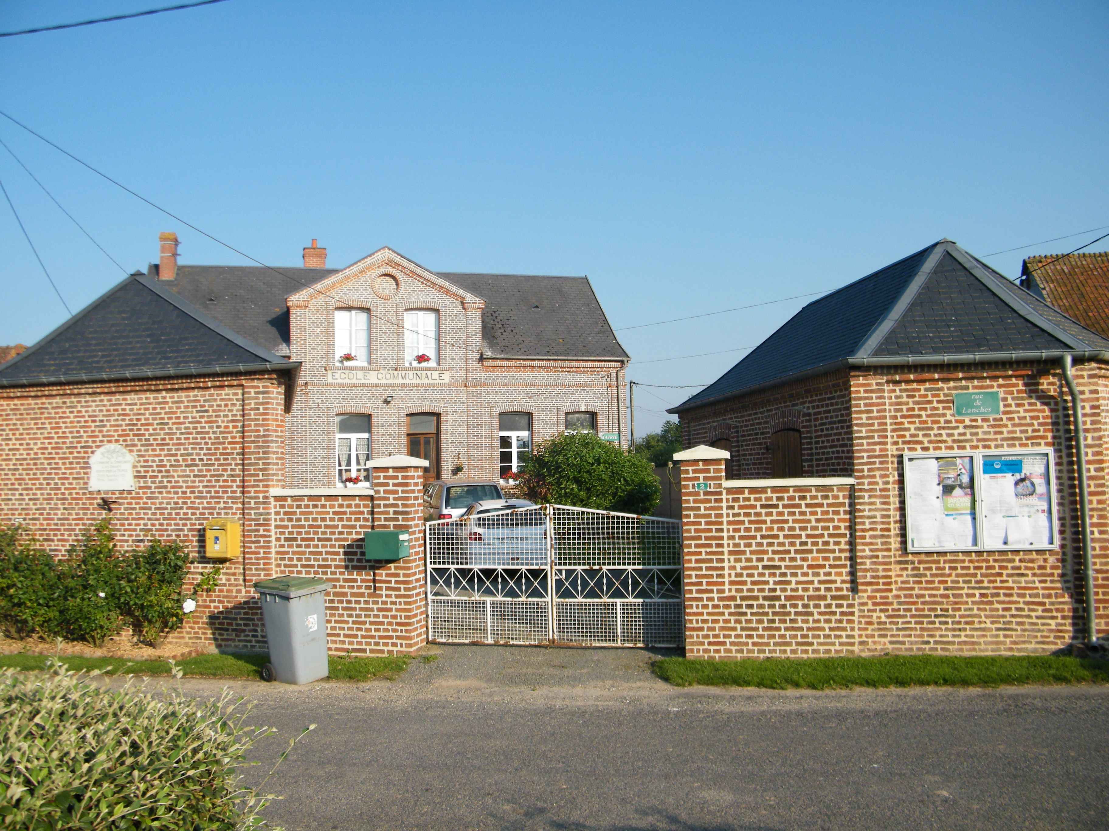 Mairie.